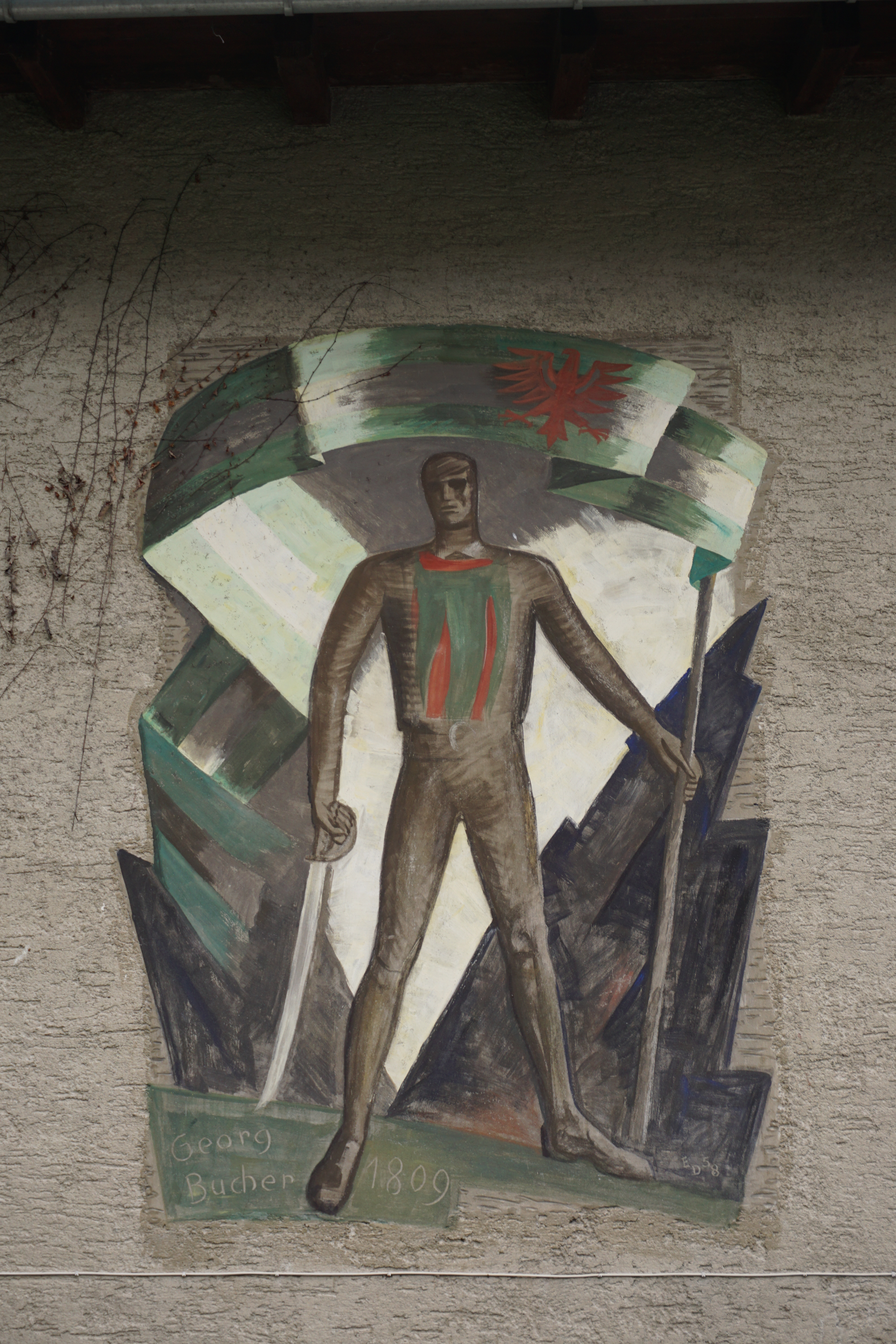 Axams Lizumstraße 9 Freske Georg Bucher